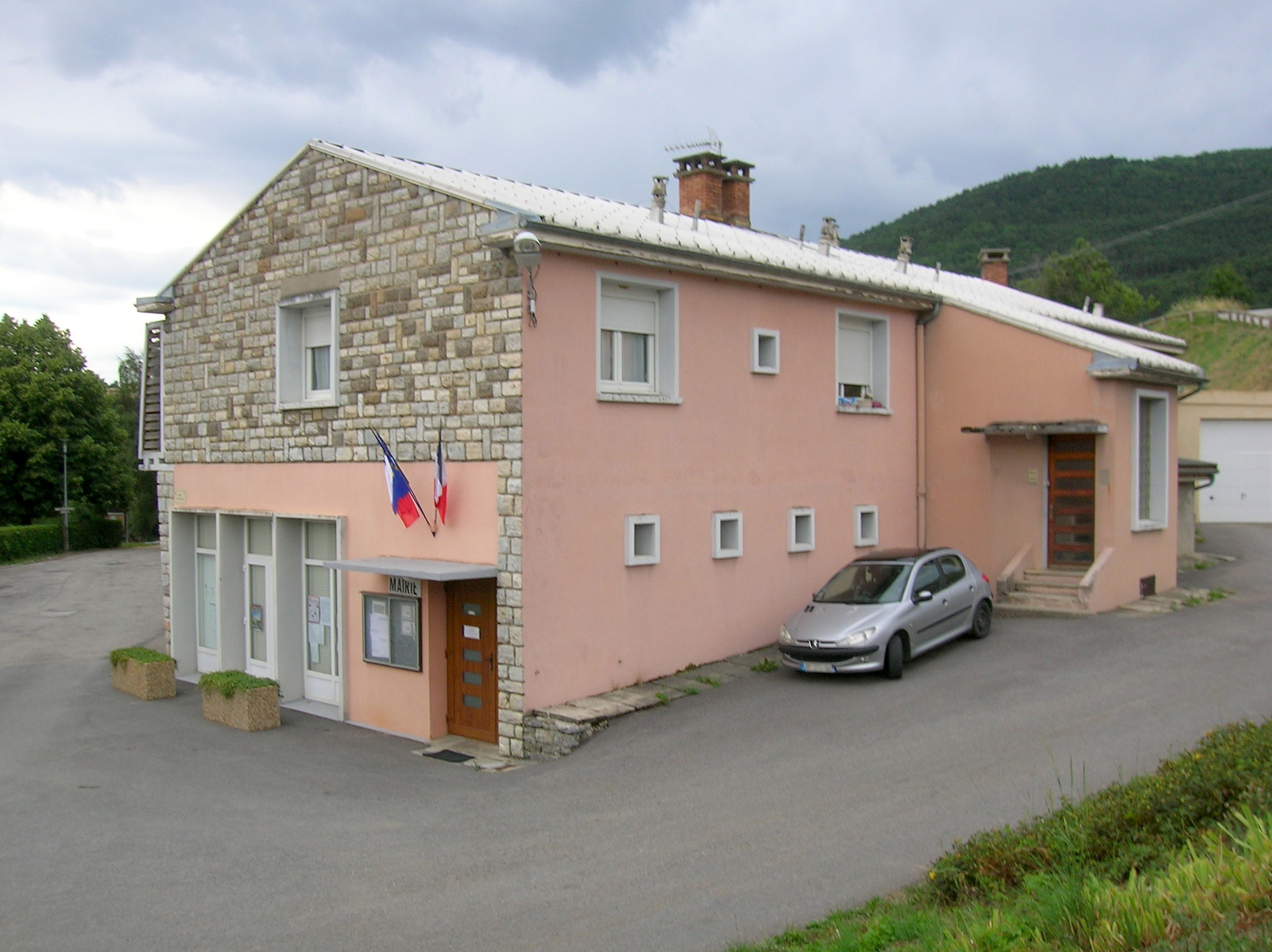 Prunières (Isère), France.